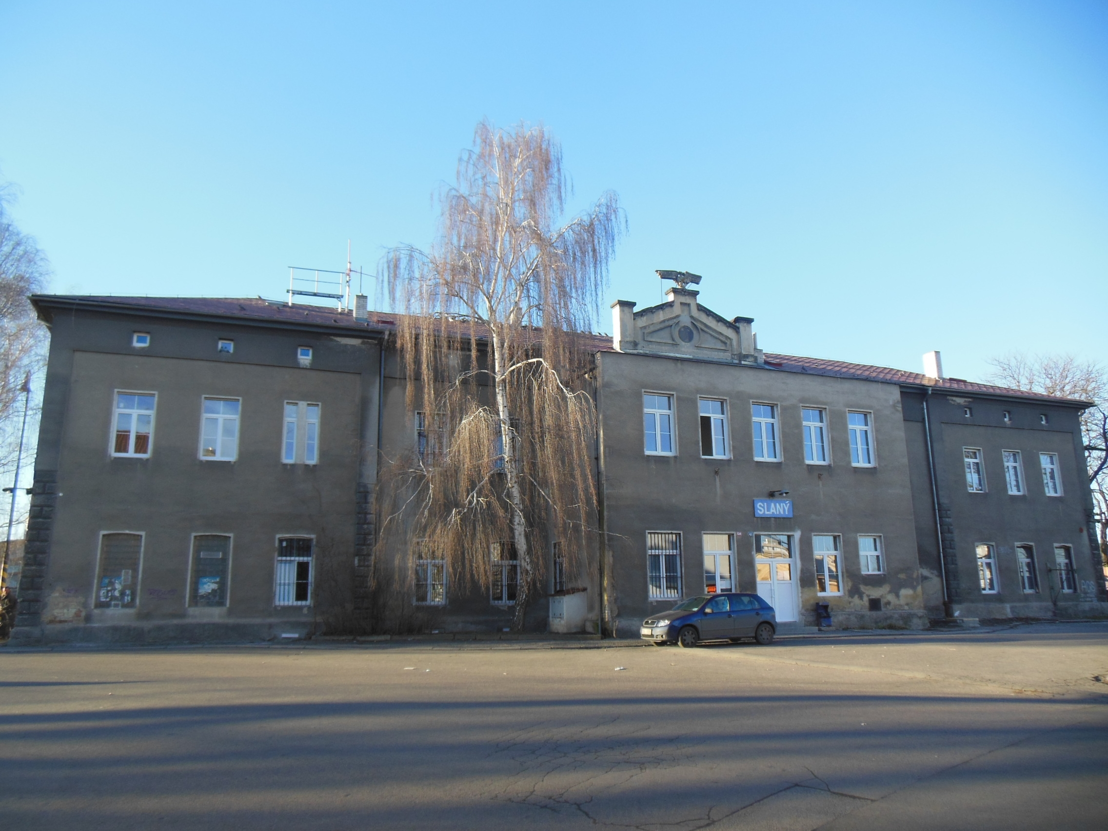 Vlakové nádraží v ulici Wilsonova ve Slaném (okres Kladno).